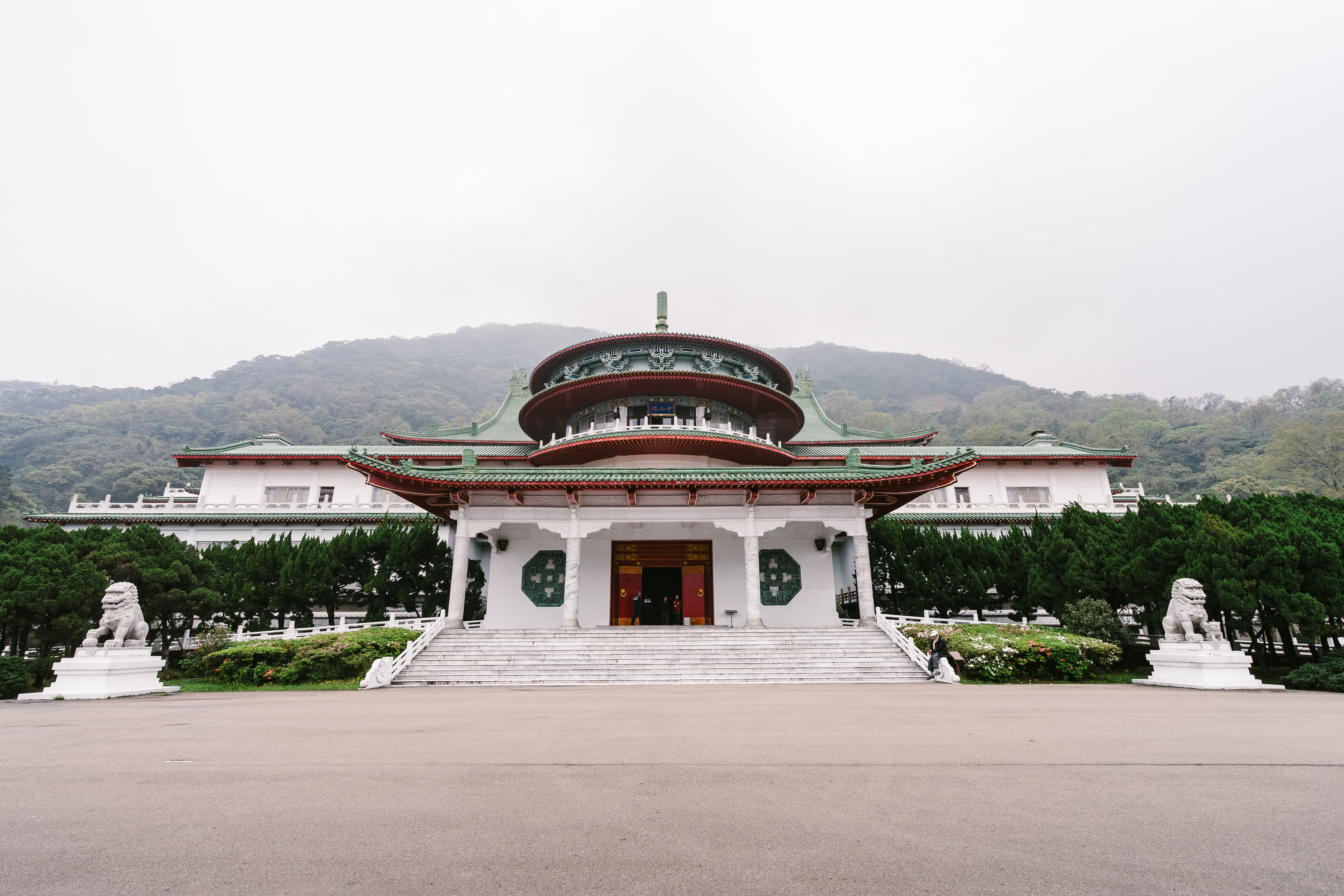 陽明山中山樓正面。